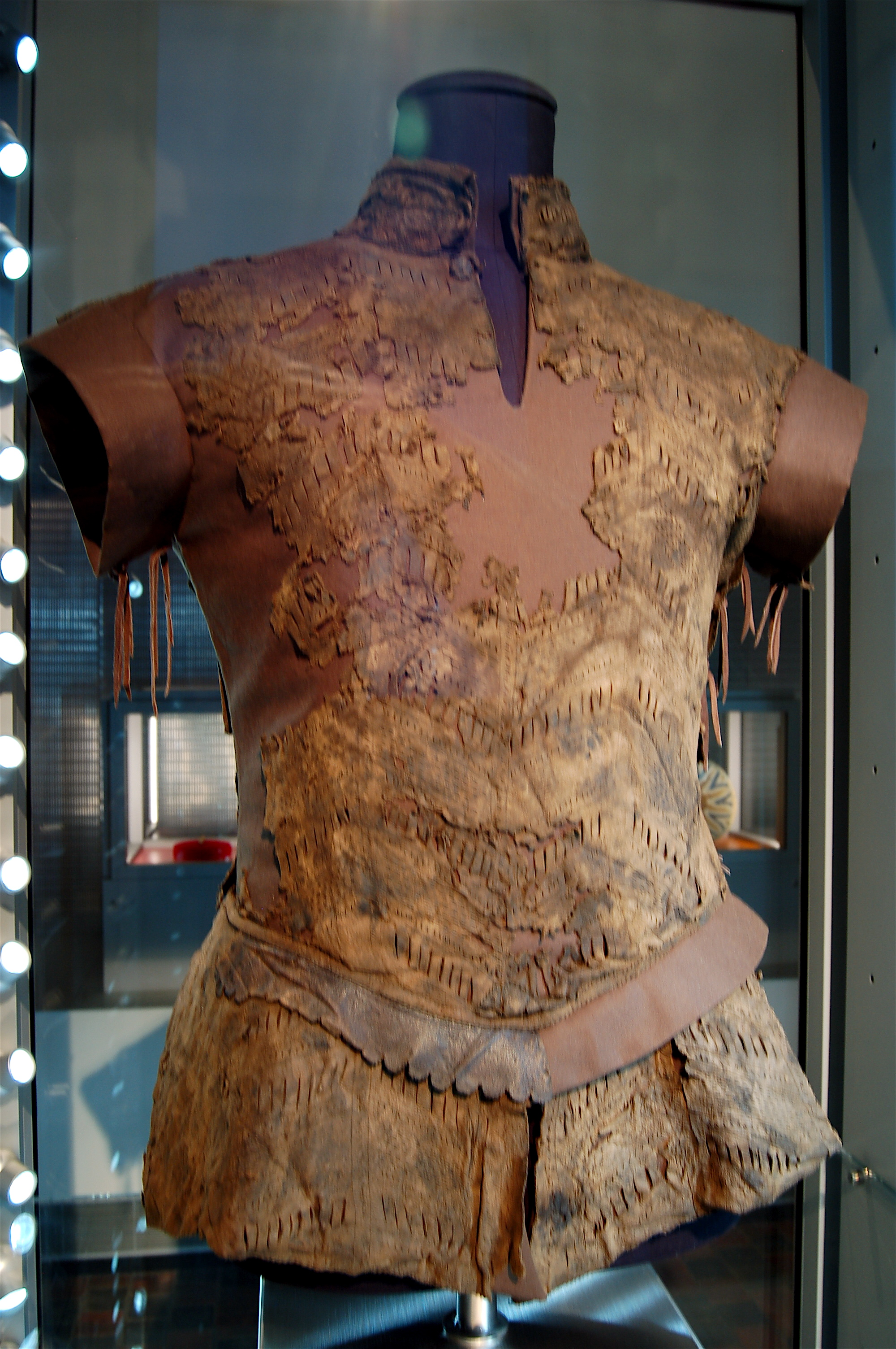 Wambuis, 1550-1600 Wambuis, 1550-1600